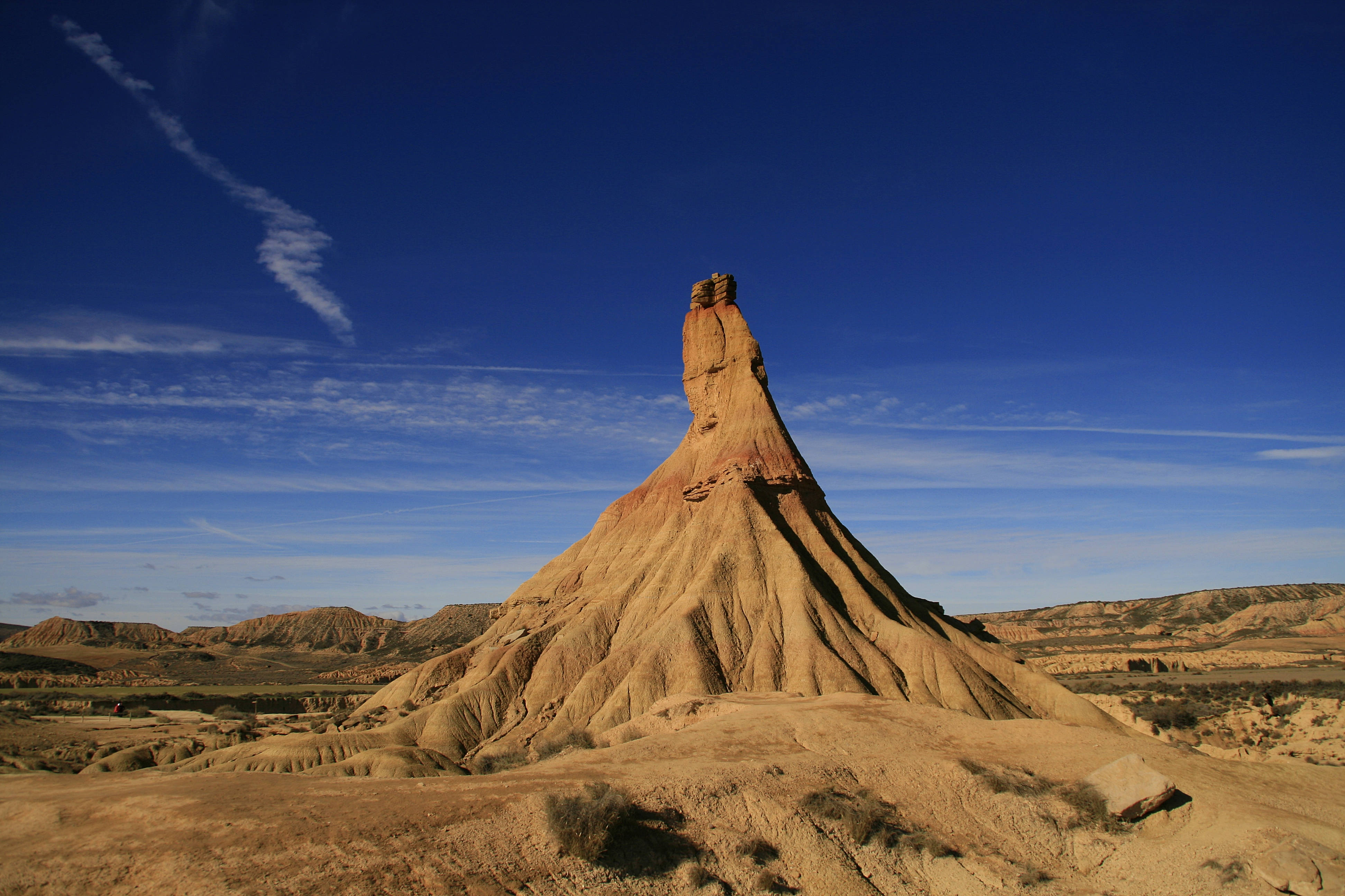 Casildetierra.